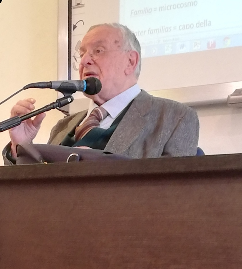 Francesco Paolo Casavola tiene una lezione di Storia del Diritto Romano all'Università degli Studi "Suor Orsola Benincasa" (2019)